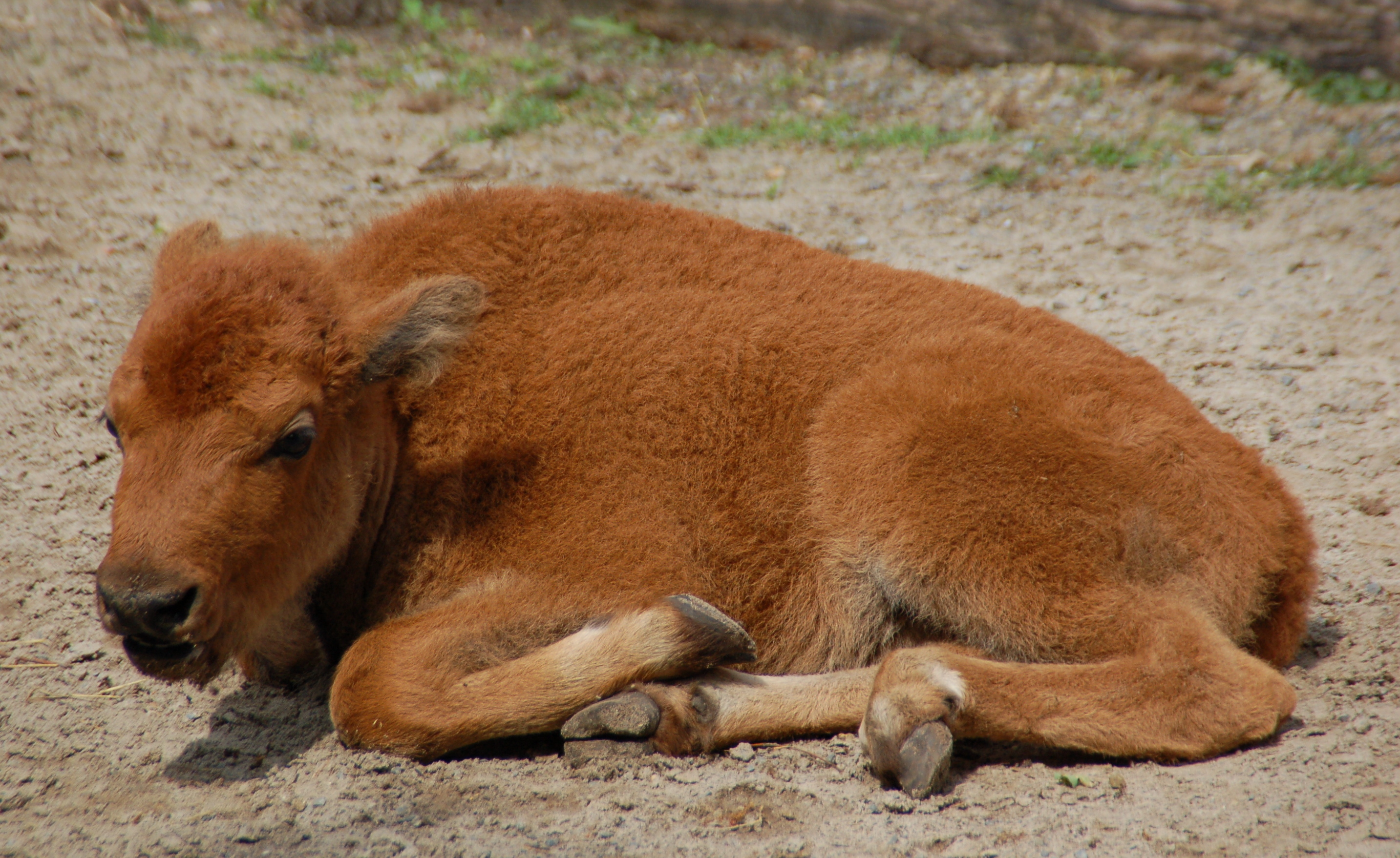 "Dolora" Tierpark Nordhorn